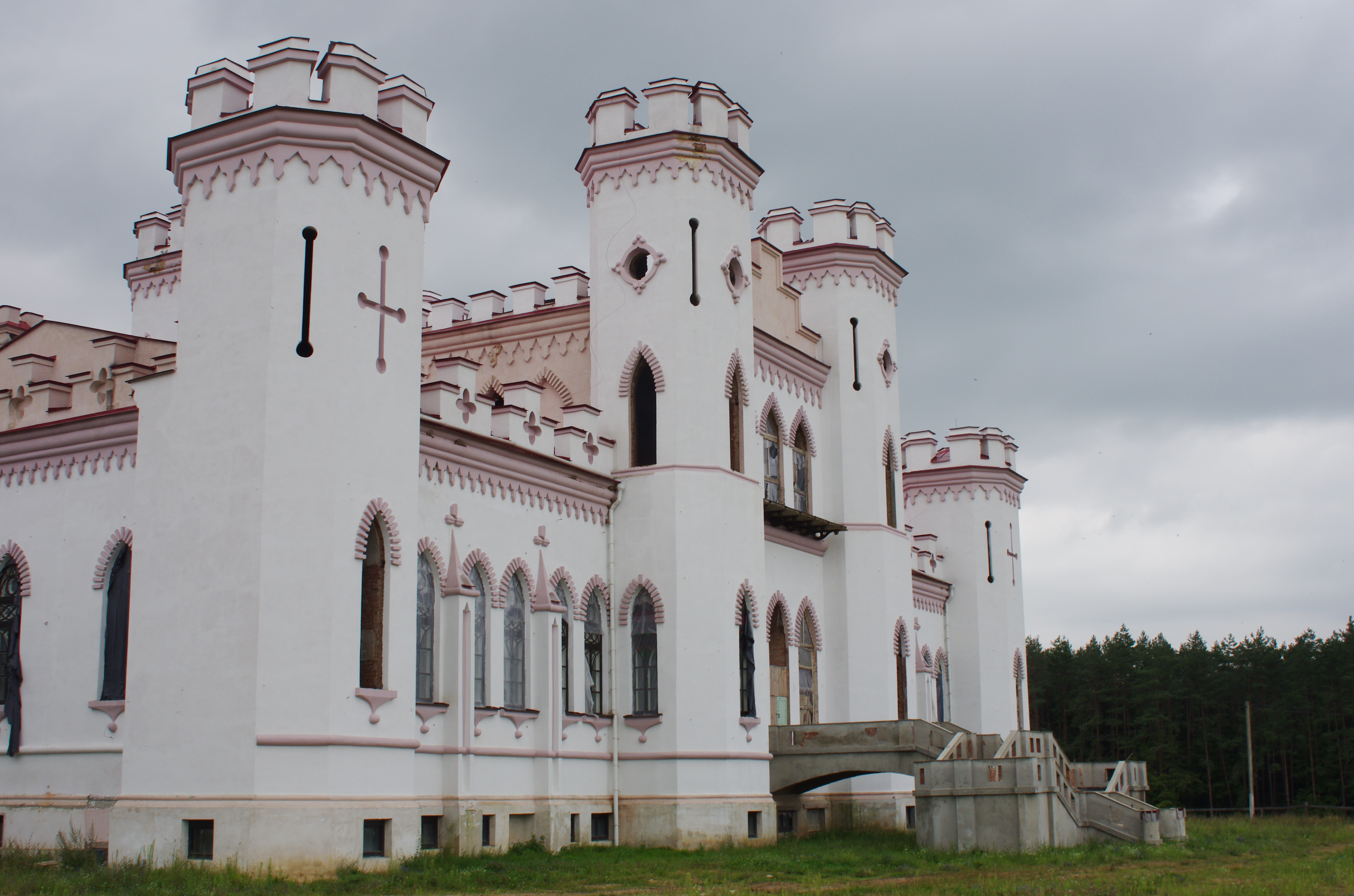 Палац Пуслоўскіх